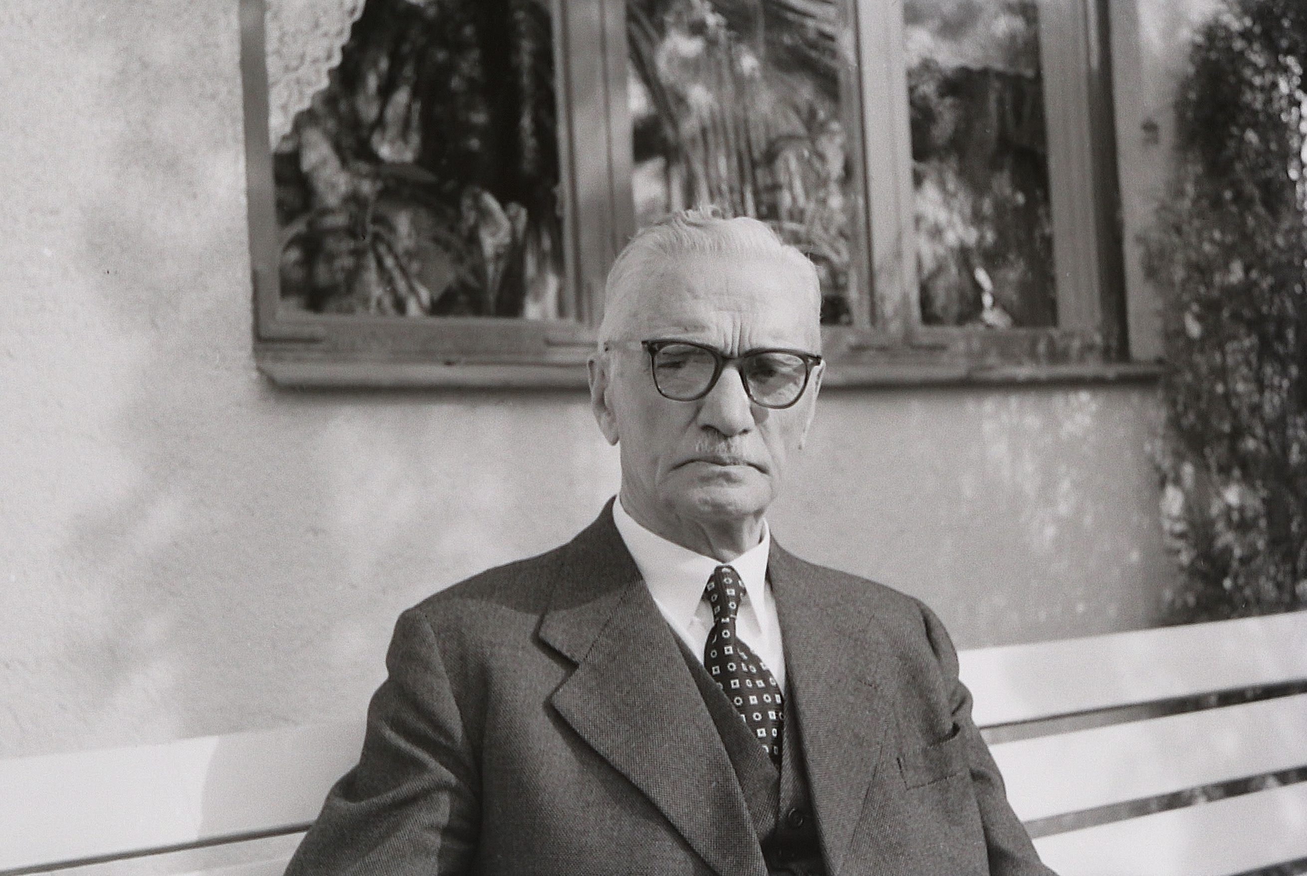 Direktör Karl August Carlén